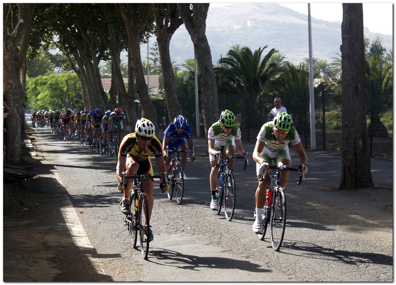 Vuelta ciclista de Tenerife a su paso por el municipio de La Laguna (2007)